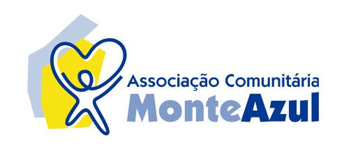 Das Logo von Monte Azul